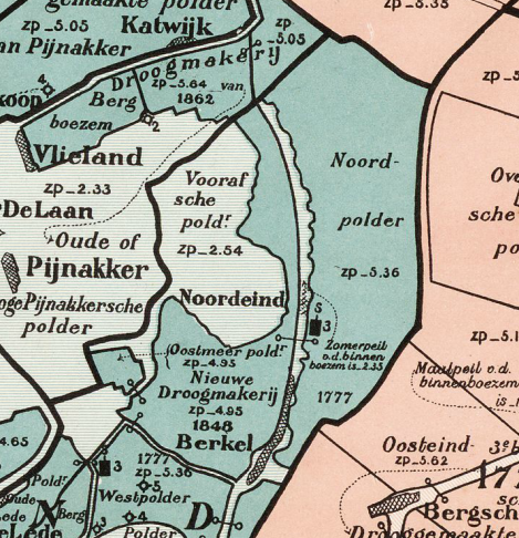 Noordpolder